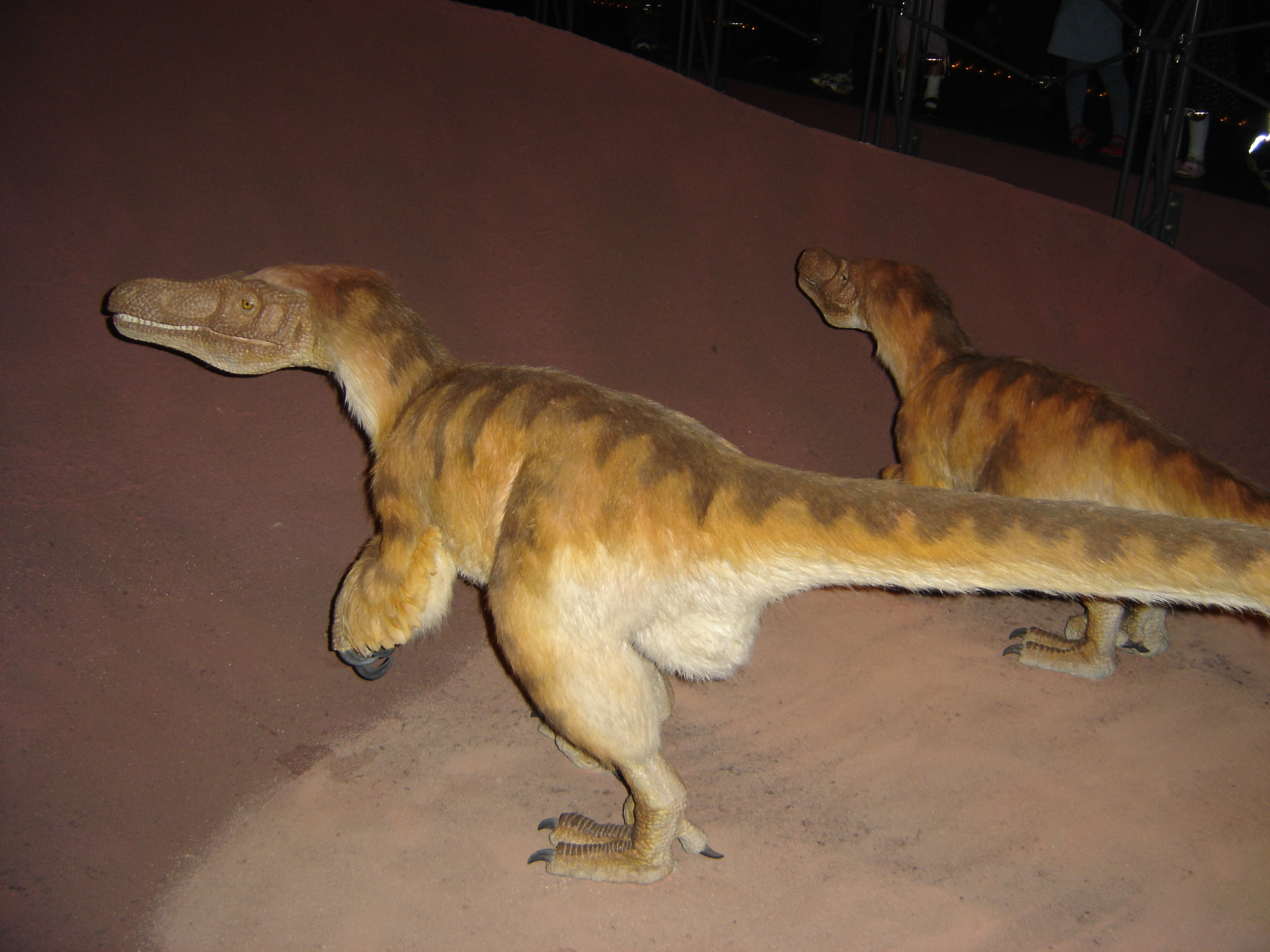 Velociraptor (image personnelle)